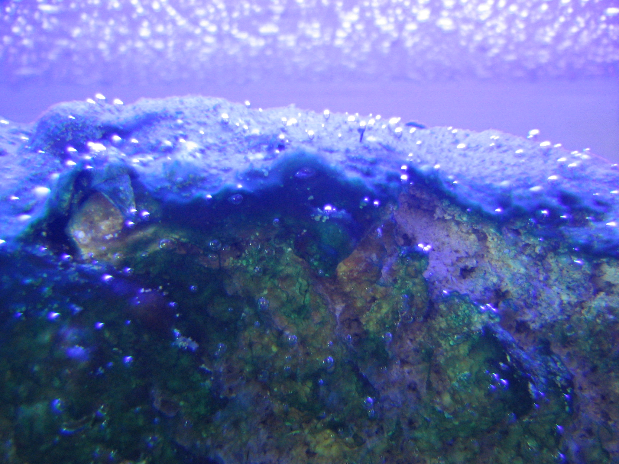 Hamelin Pool (Stromatolites)